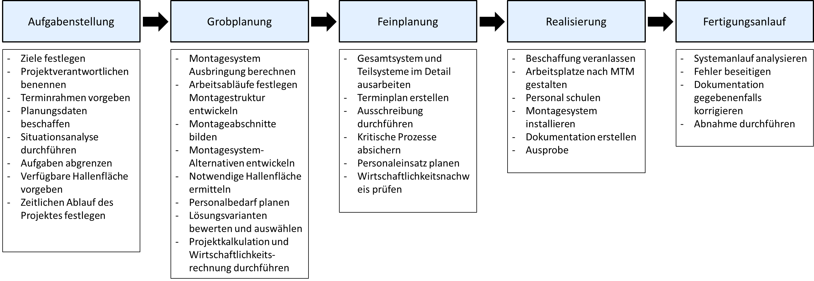 Phasen der Montageplanung und deren wesentliche Inhalte. Eigene Darstellung in Anlehnung an Konold und Reger (2003) [1] ↑ Konold, P.; Reger, H. (2003): Praxis der Montagetechnik. Produktdesign, Planung, Systemgestaltung. 2., überarb. und erw. Aufl. Wiesbaden: Vieweg, S. 32. ISBN 978-3-528-13843-1